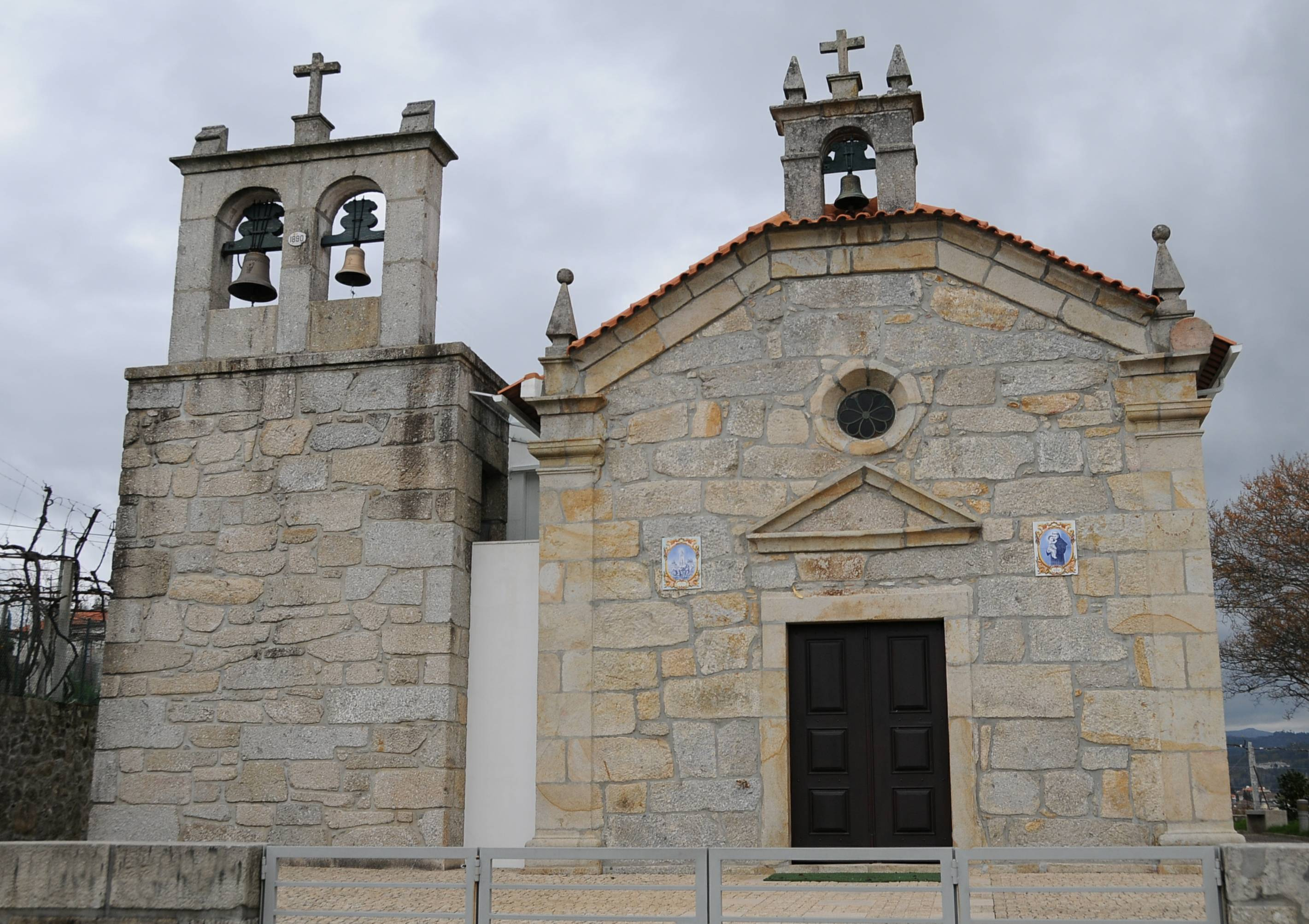 Galegos Church, in Povoa de Lanhoso, Portugal